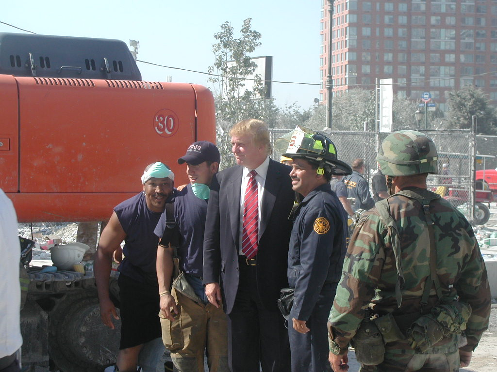 Trump am World Trade Center (Ground Zero) am 13.Sept 2001